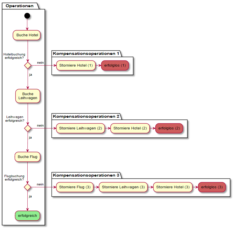 Beispiel zum Saga Entwurfsmuster in UML-Darstellung